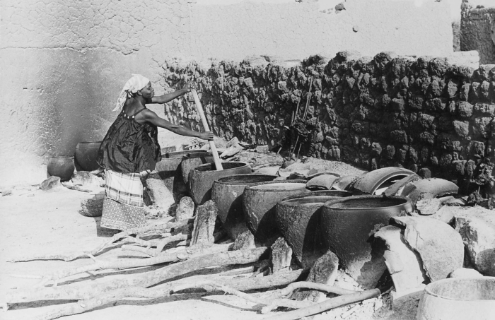 Het bier (dolo) wordt door de vrouwen uit gierst gebrouwen. De opname is gemaakt tijdens één van de twee verzamelexpedities die het Tropenmuseum in 1970-1971 ondernam ter voorbereiding op de grote tentoonstelling in 1971-1972, getiteld 'Samo. Een Afrikaans Savannevolk in ontwikkeling'. De expedities duurden elk drie maanden en werden uitgevoerd door de heren J.T. Broekhuijse en F.M. Cowan.